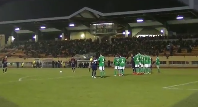 Photo du match opposant l'ASM Belfort à la réserve de l'AS St-Etienne le 28 mars 2015